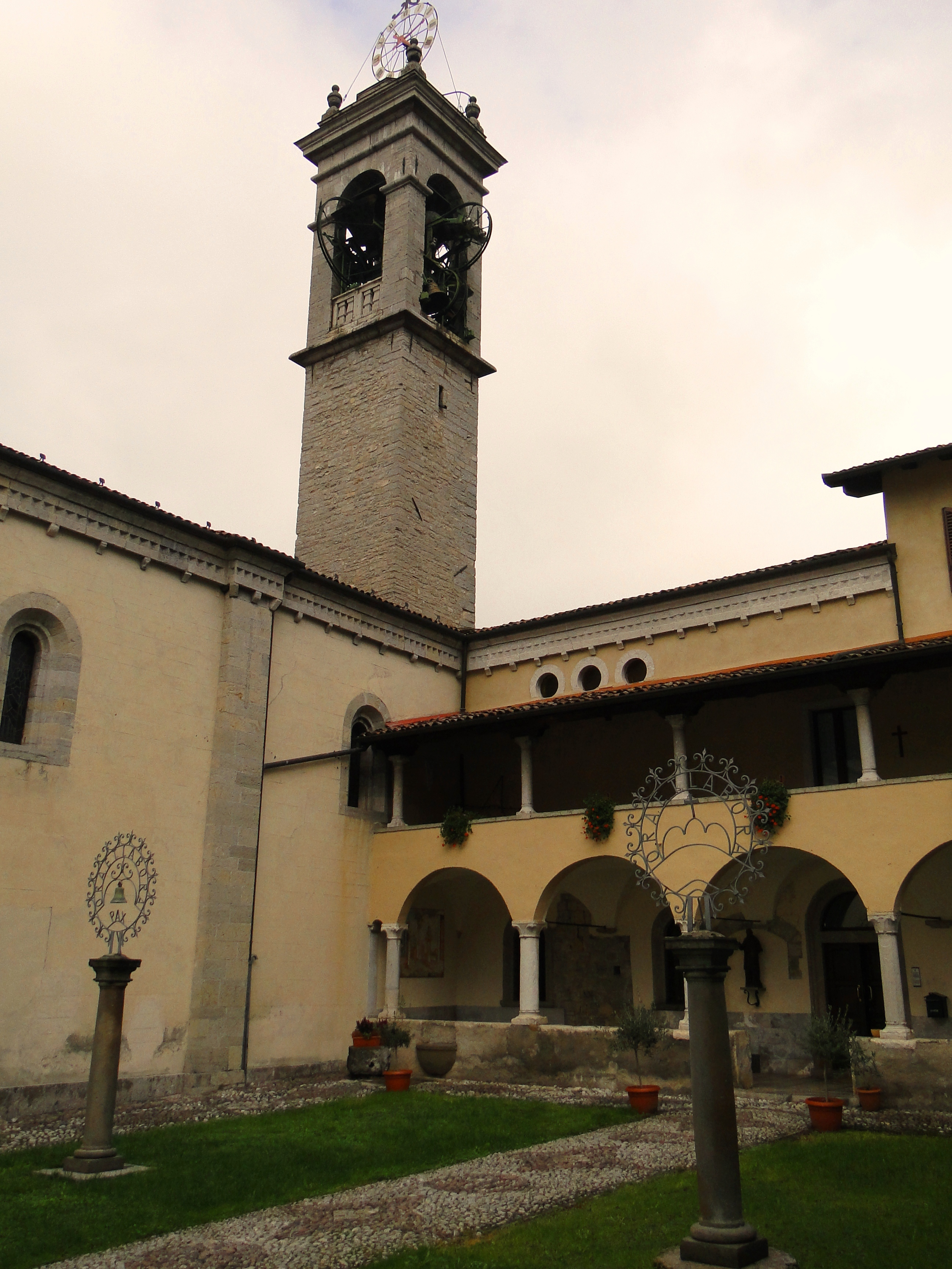 Abbazia san Benedetto in Vallalta, Abbazia di Albino (BG). Chiostro con chiesa